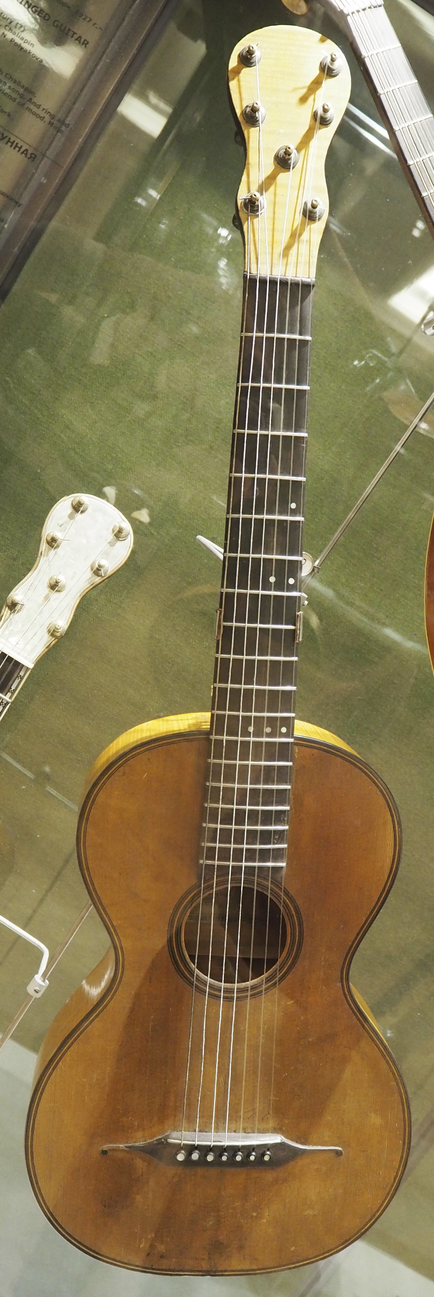 Гитара Татьяны Демьяновой (цыганки Тани) работы Ивана Краснощёкова. Российский национальный музей музыки.